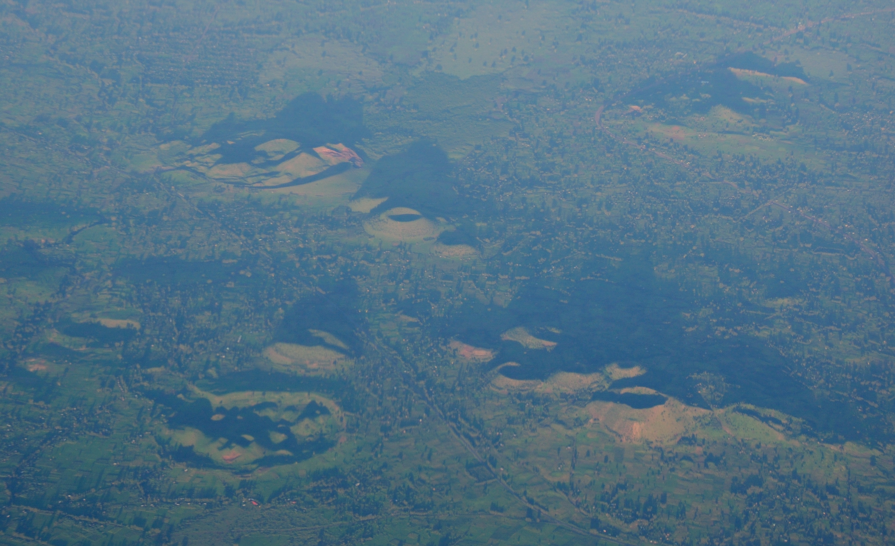 Ethiopia, Butajiri-Silti volcanic field